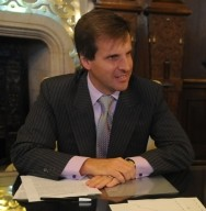 La presidenta Cristina Fernández recibió en su despacho al presidente del Banco Central, Martín Redrado, quien le informó que las reservas llegaron a u$s 50.000 millones.